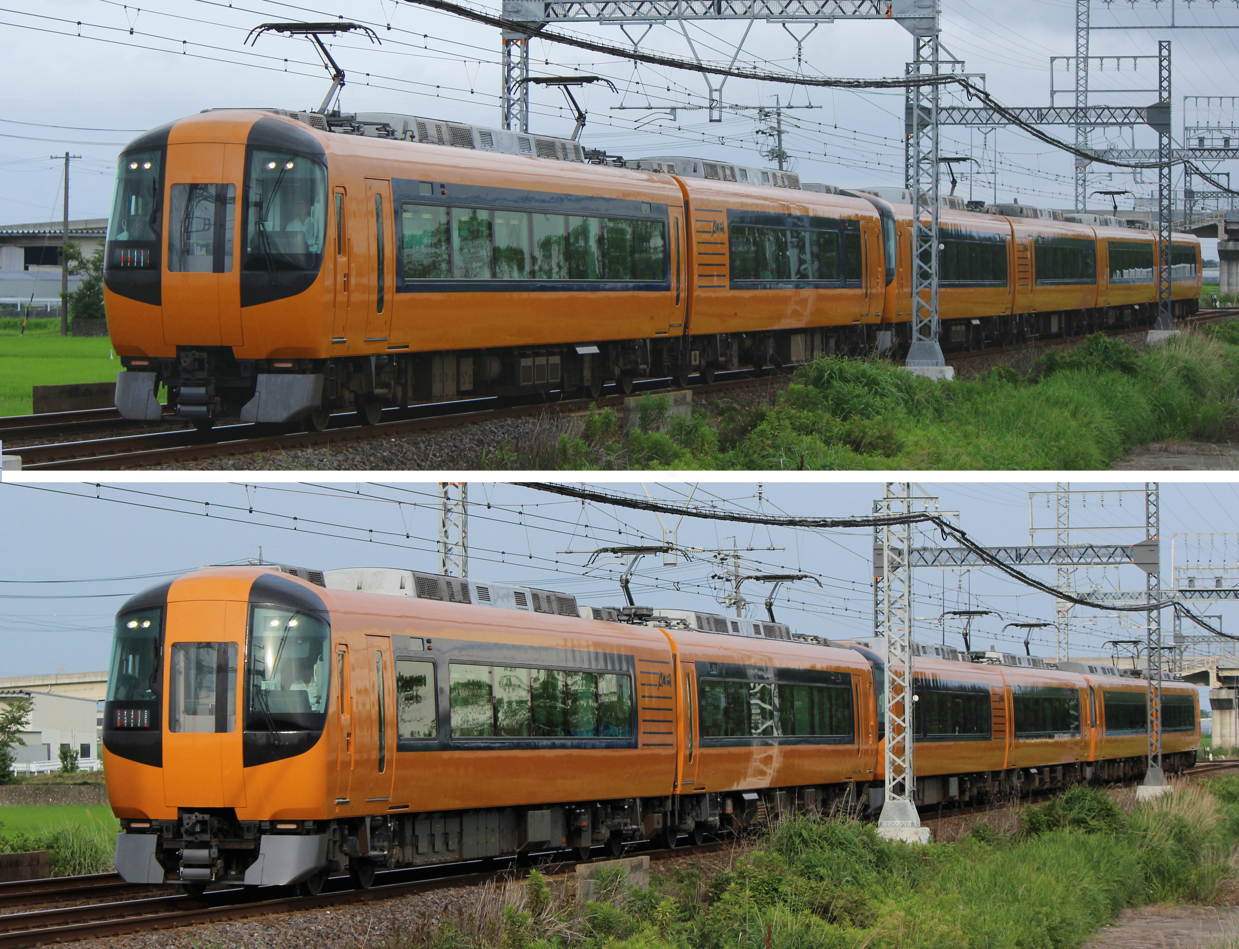 山田線櫛田駅-東松阪間における名伊、阪伊両特急のパンタグラフ位置の比較